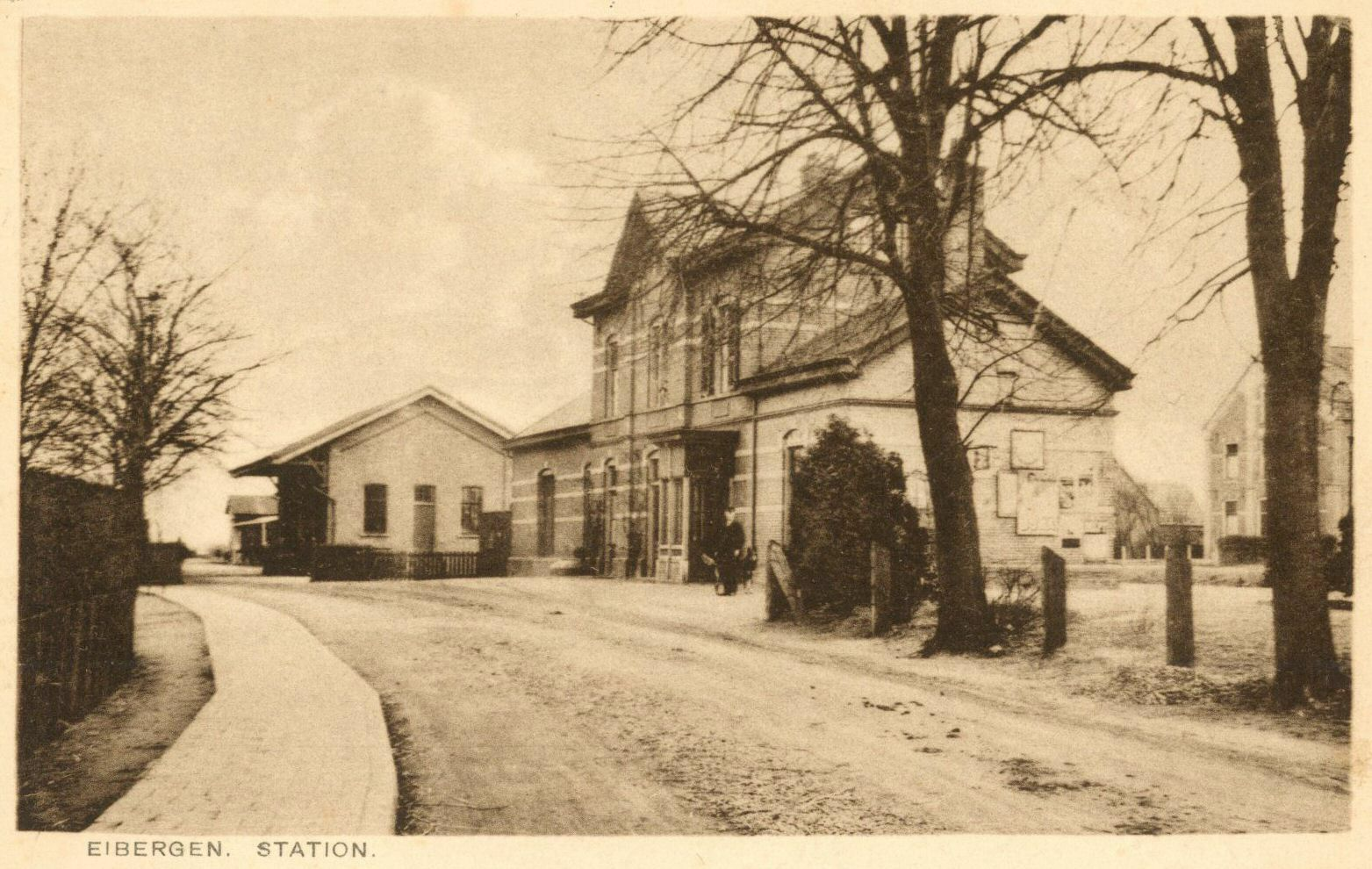 Gezicht op het N.S.-station Eibergen te Eibergen.